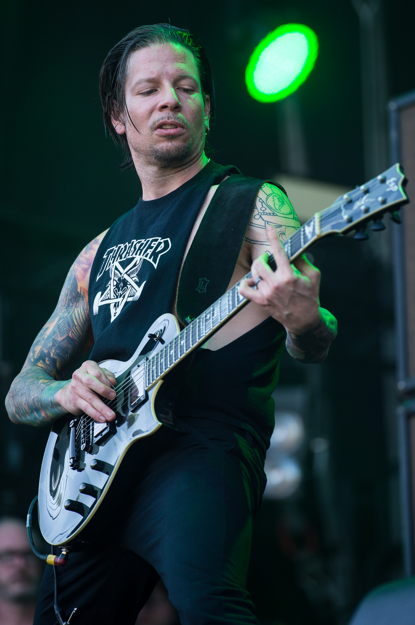 ARGO-Konzerte,Beck's Park Stage,Festival,Konzert,Lamb of God,Livekonzert,Livemusik,Musik,RiP,Rock im Park 2015,Willie Adler